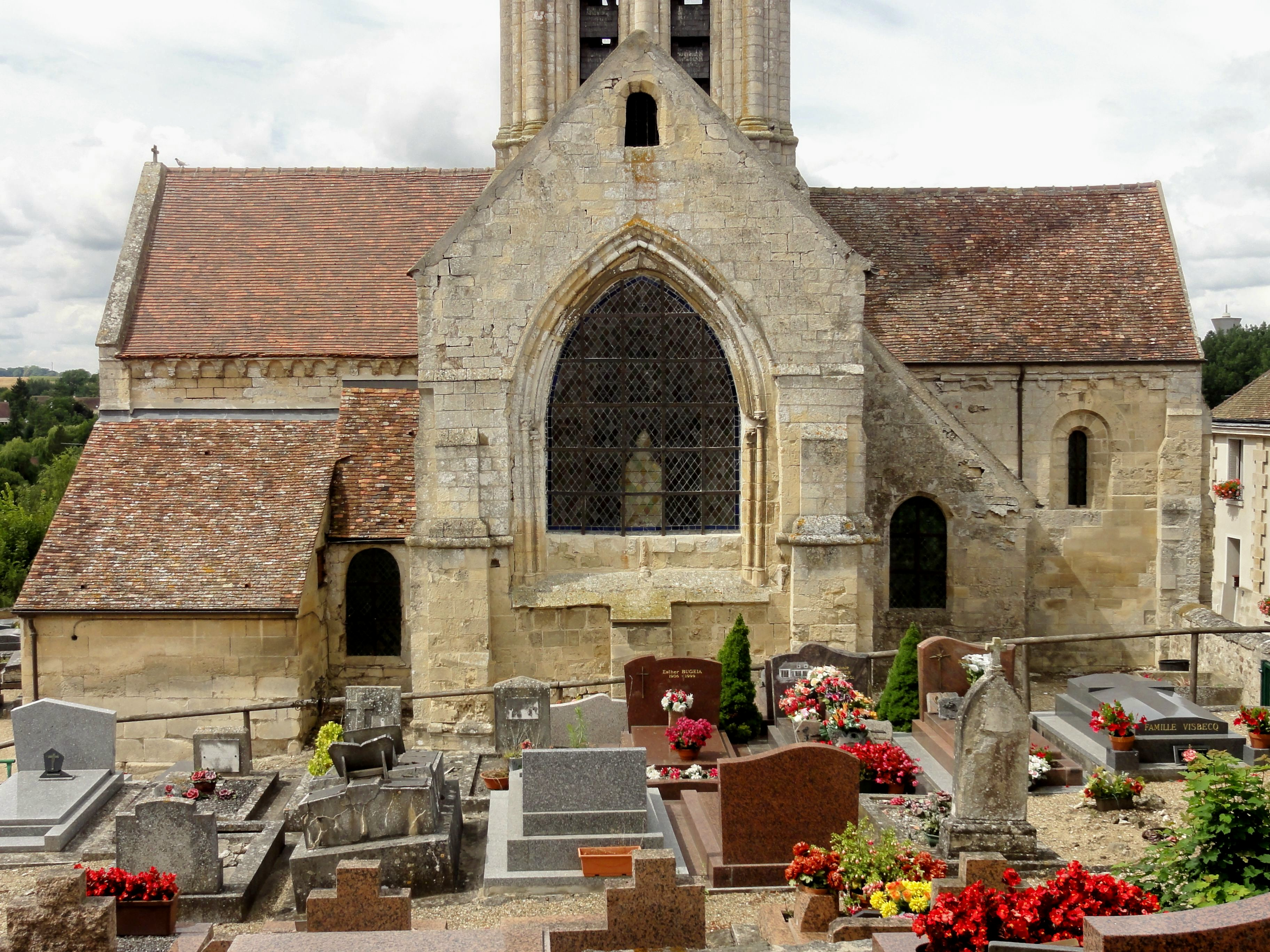 Chevet.